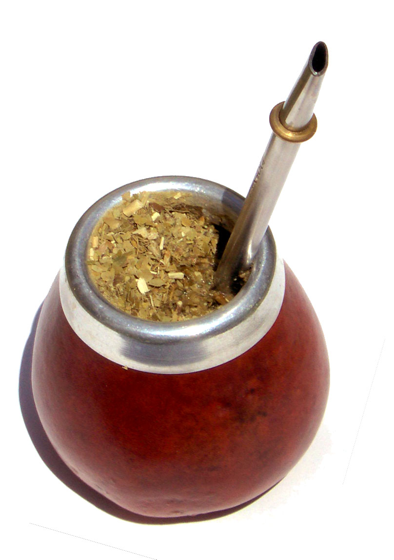 Jorge Alfonso Hernández Mate, recipiente, yerba